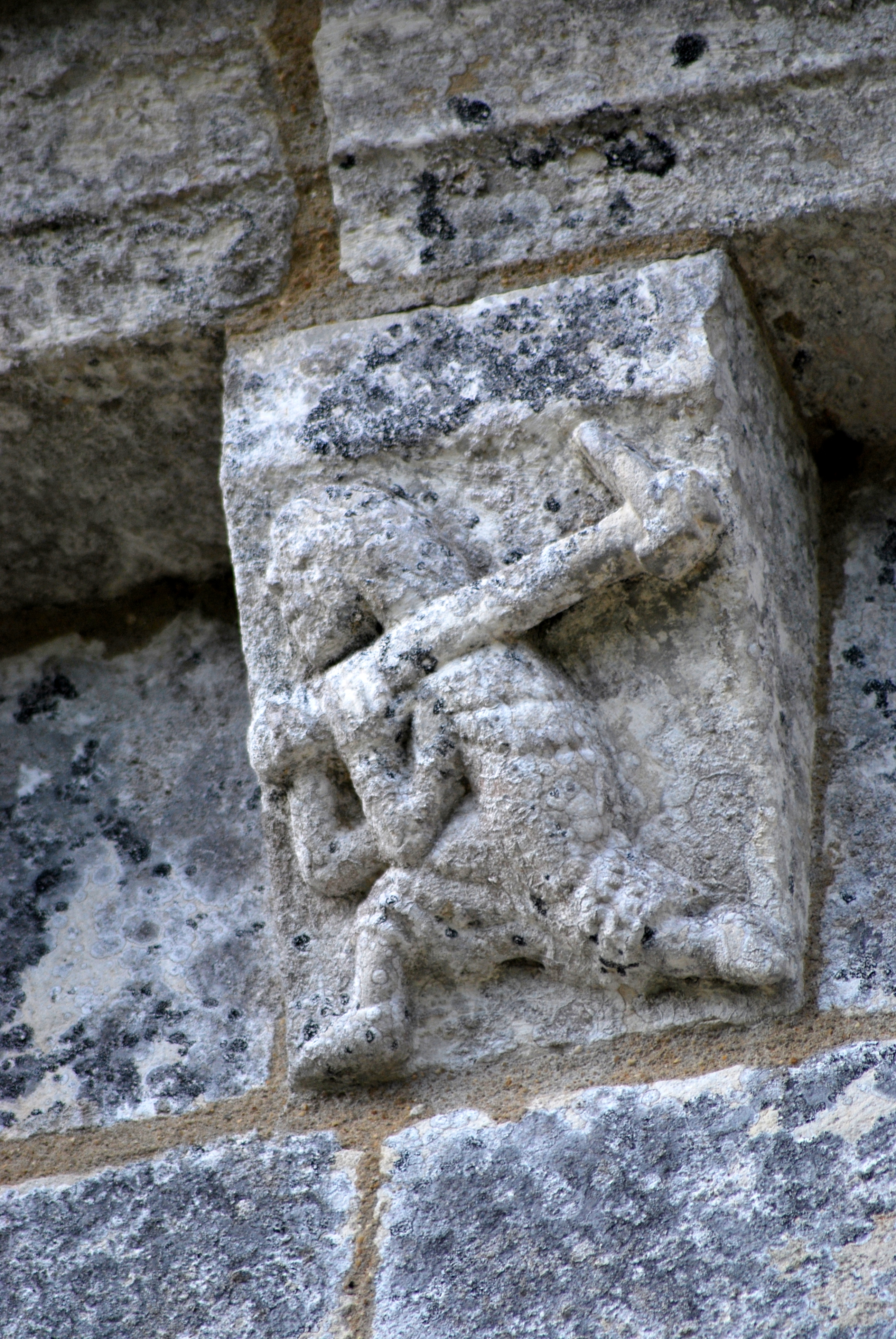 Modillons de l'église Notre-Dame de Lestiac-sur-Garonne